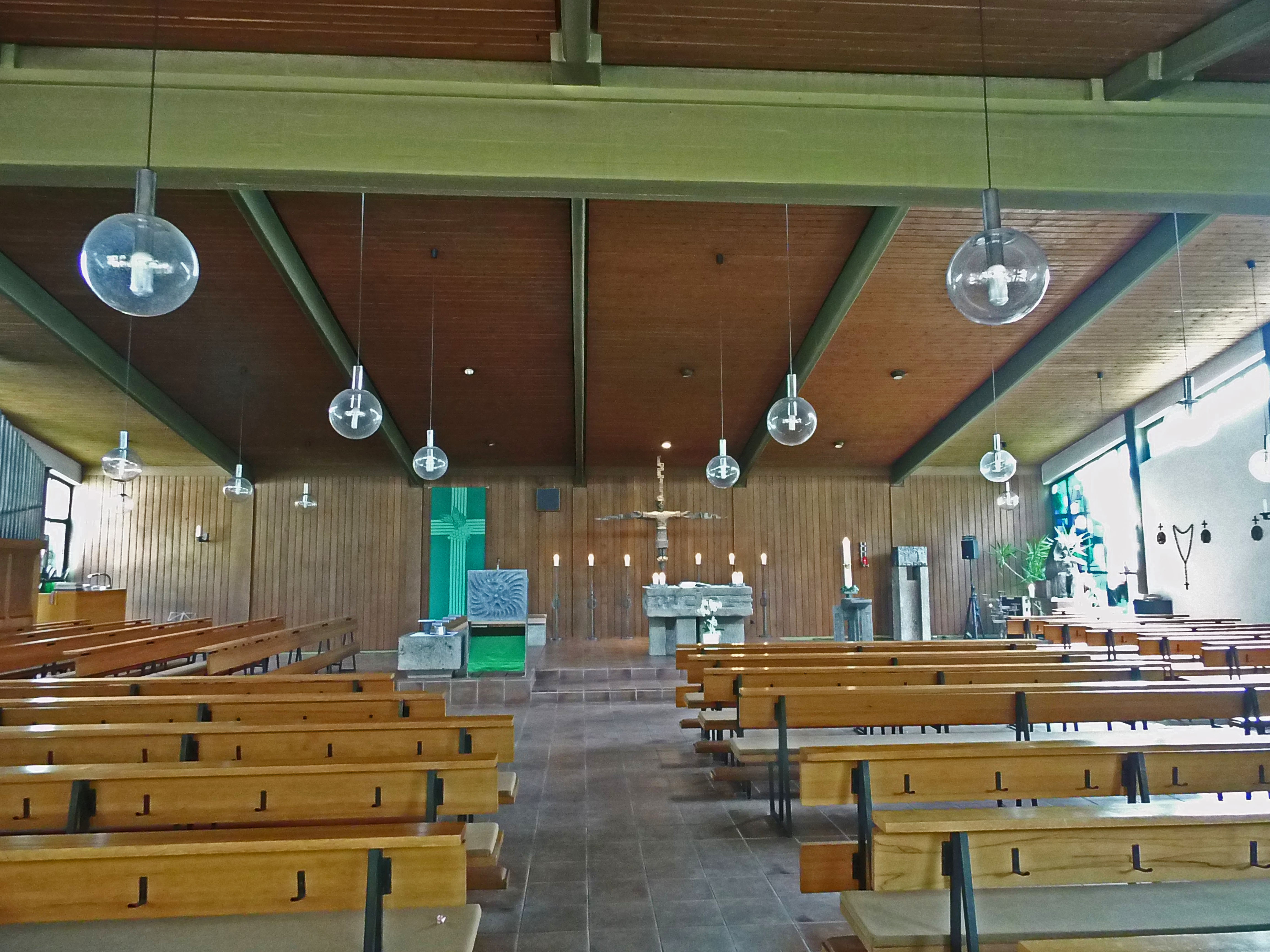 Katholische Heilig-Kreuz-Kirche in Altwarmbüchen